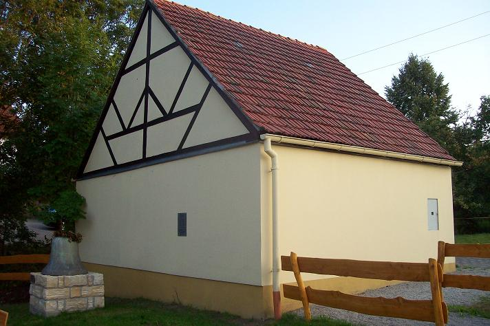 Spritzenhaus Pohrsdorf mit Glockendenkmal